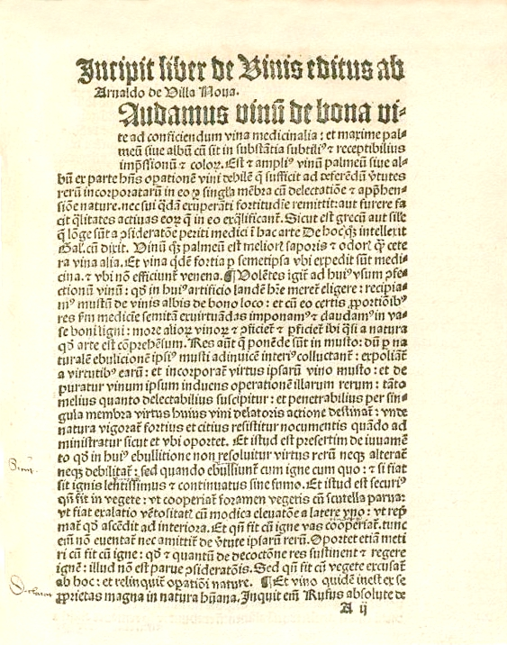 Arnaldi de Villanoua liber de vinis. Section : Incipit liber de vinis editus ab Arnaldo de Villa Noua. Audamus vinum de bona vite ad conficiendum vina medicinalia (Leipzig : Lotter, après 1500?)